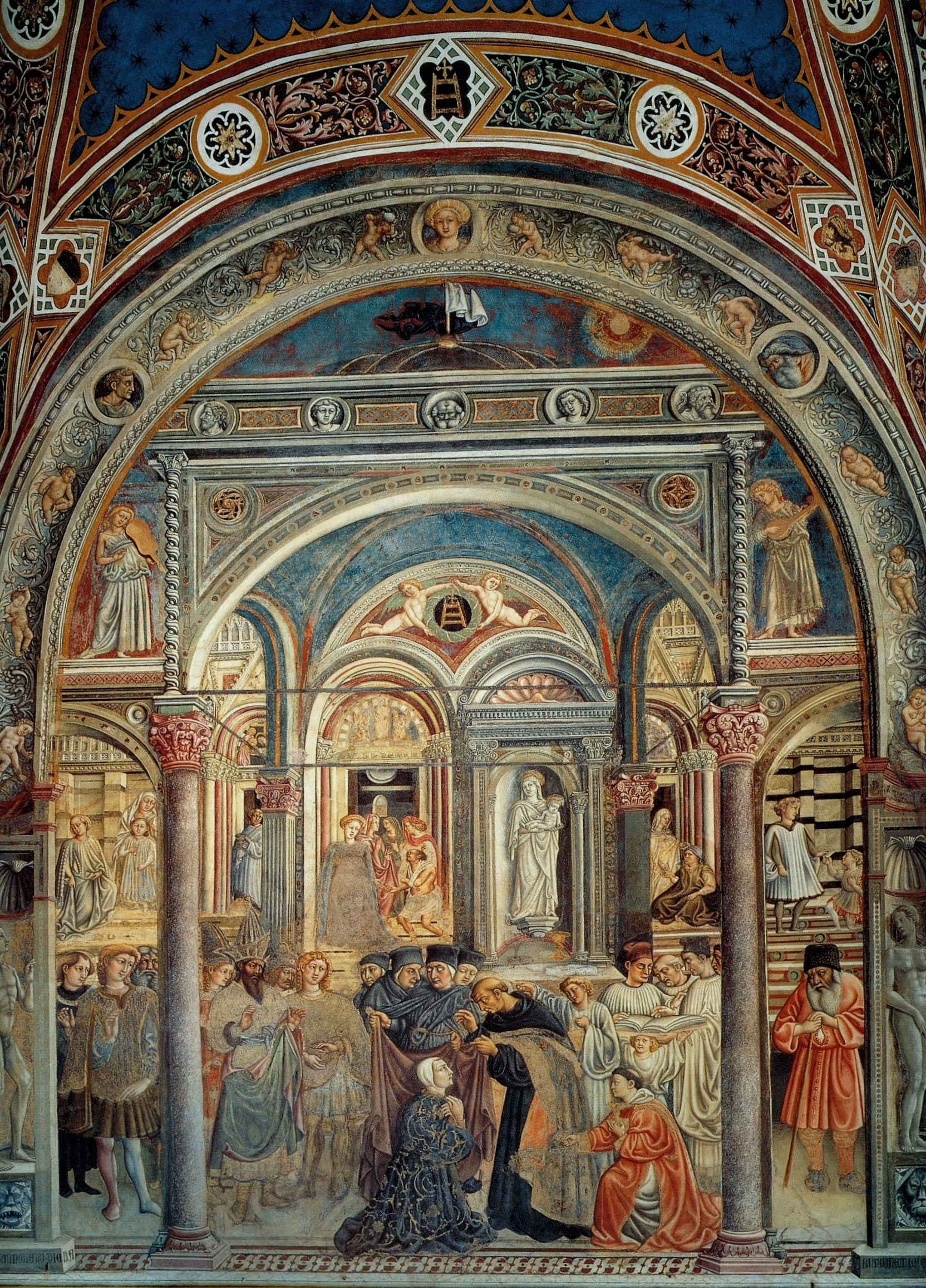 Santa maria della Scala fresco. Priamo della Quercia